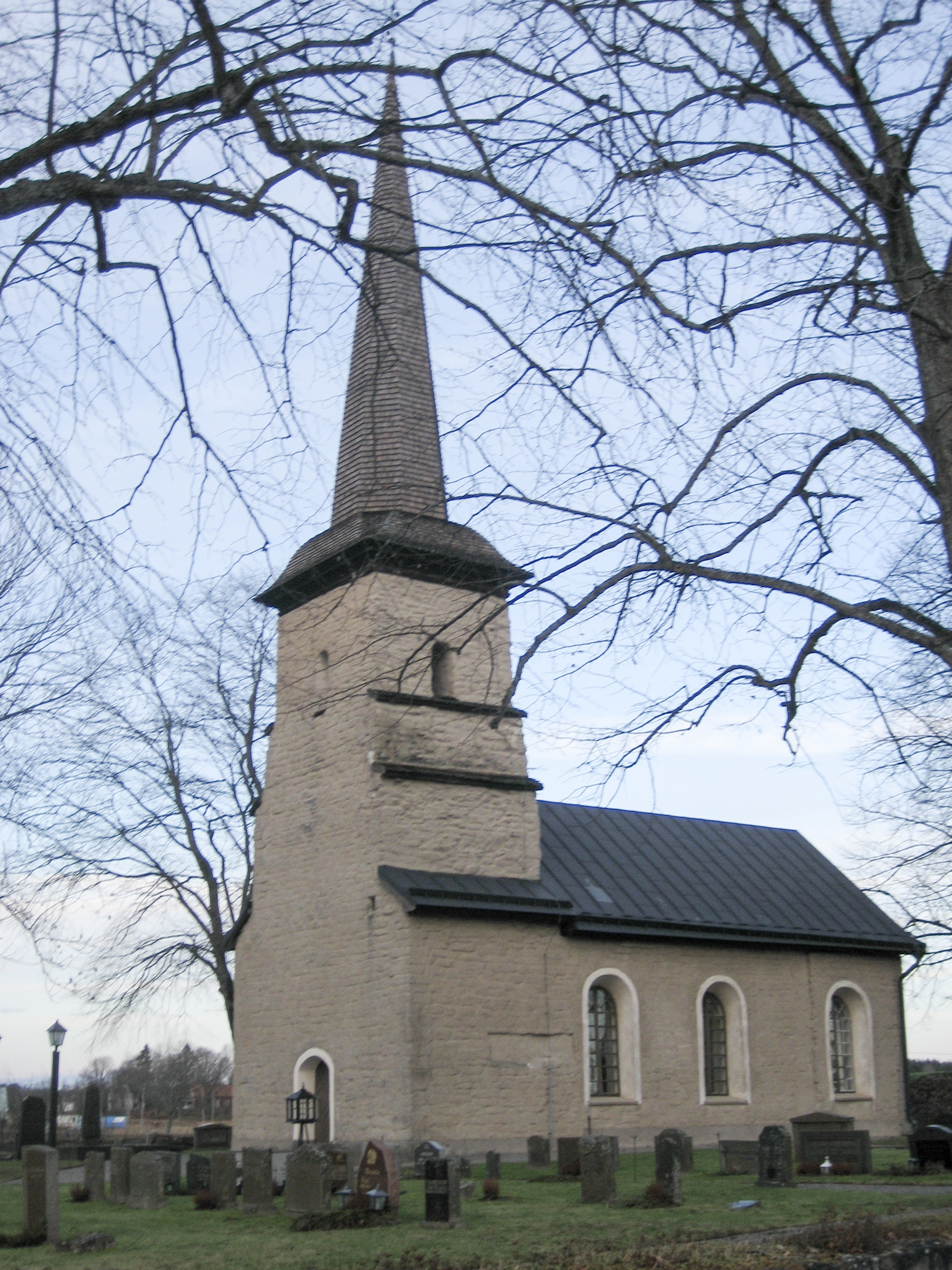 Ekers kyrka in Örebro, Sweden